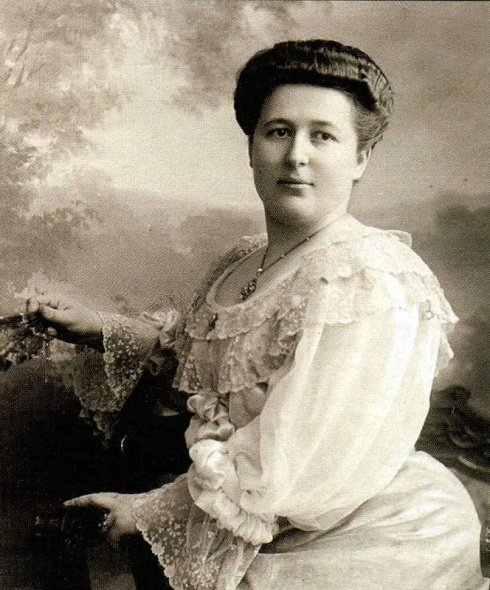 Баронесса София Михайловна Бюнтинг, ур. Медем (1876—1948)